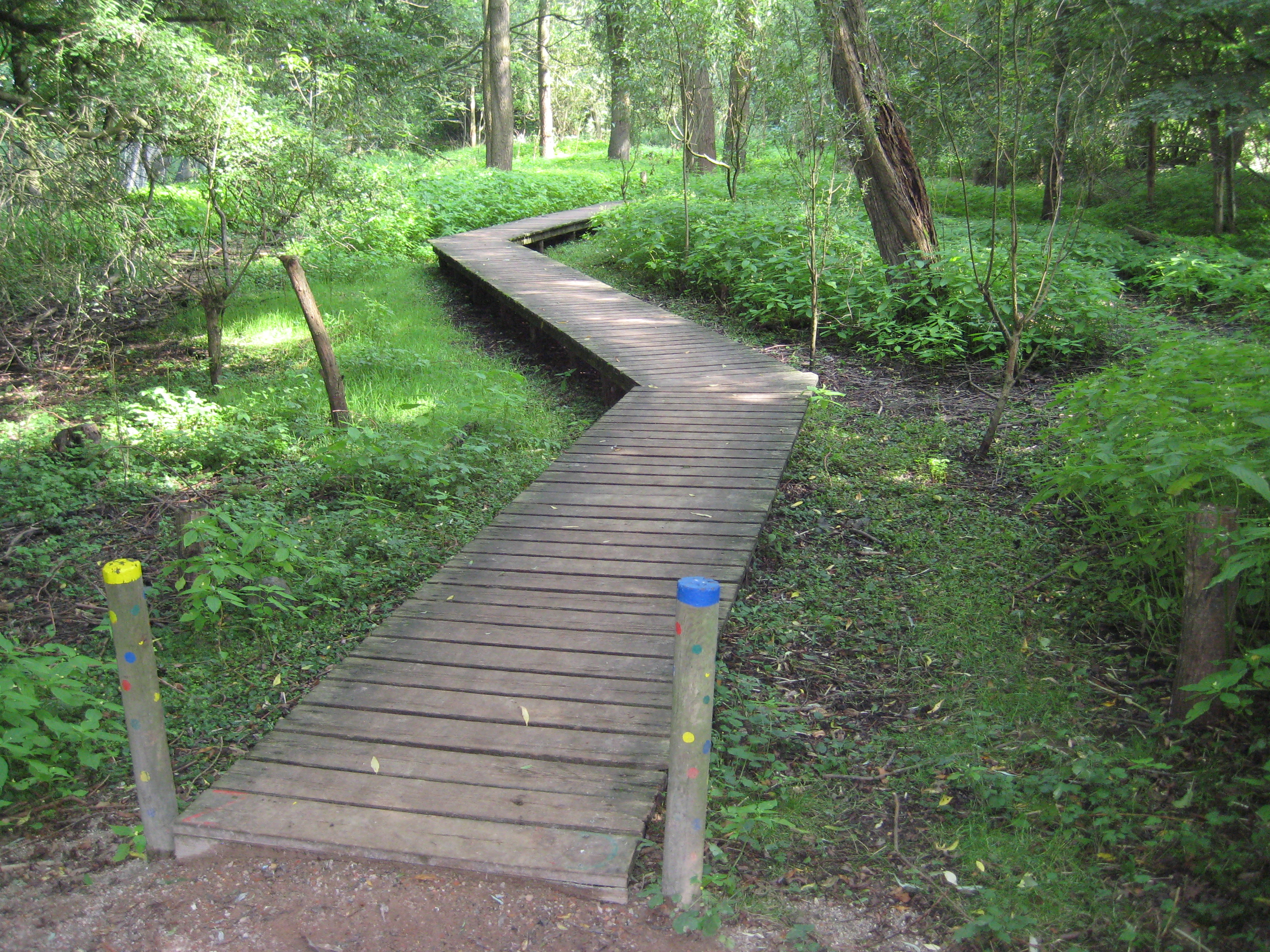 Tierpark Neumünster Zugang zum Geisterwald